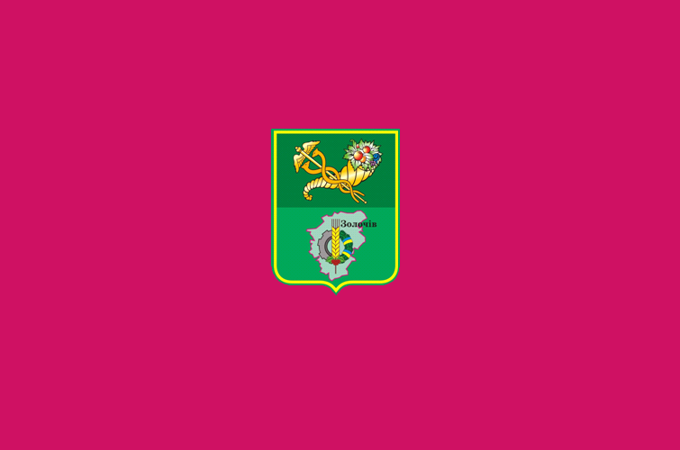 Прапор Золочівського району Харківської області України